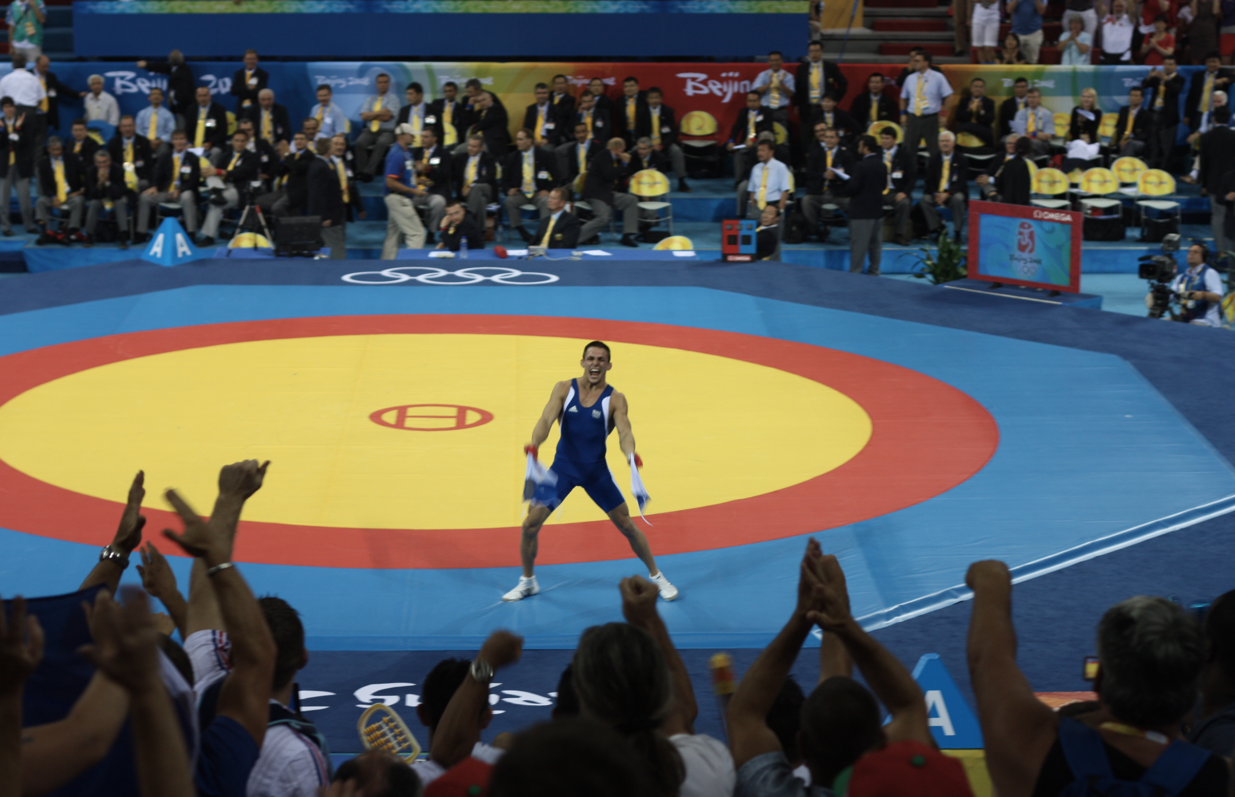 Steeve Guenot champion olympique de lutte Jeux olympiques d'été de 2008 à Pékin